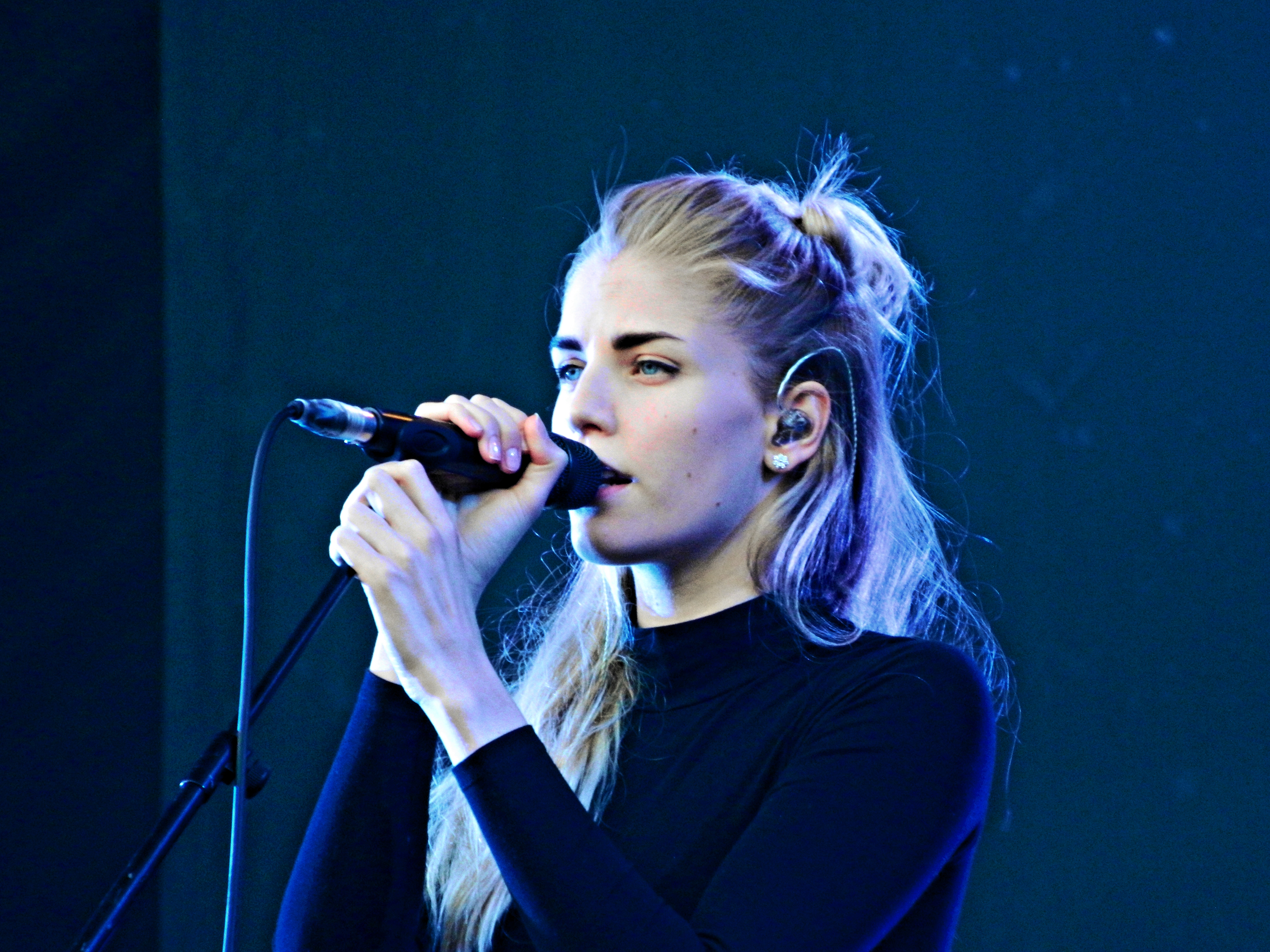 London Grammar, MainSquare Festival 2014, Arras, France